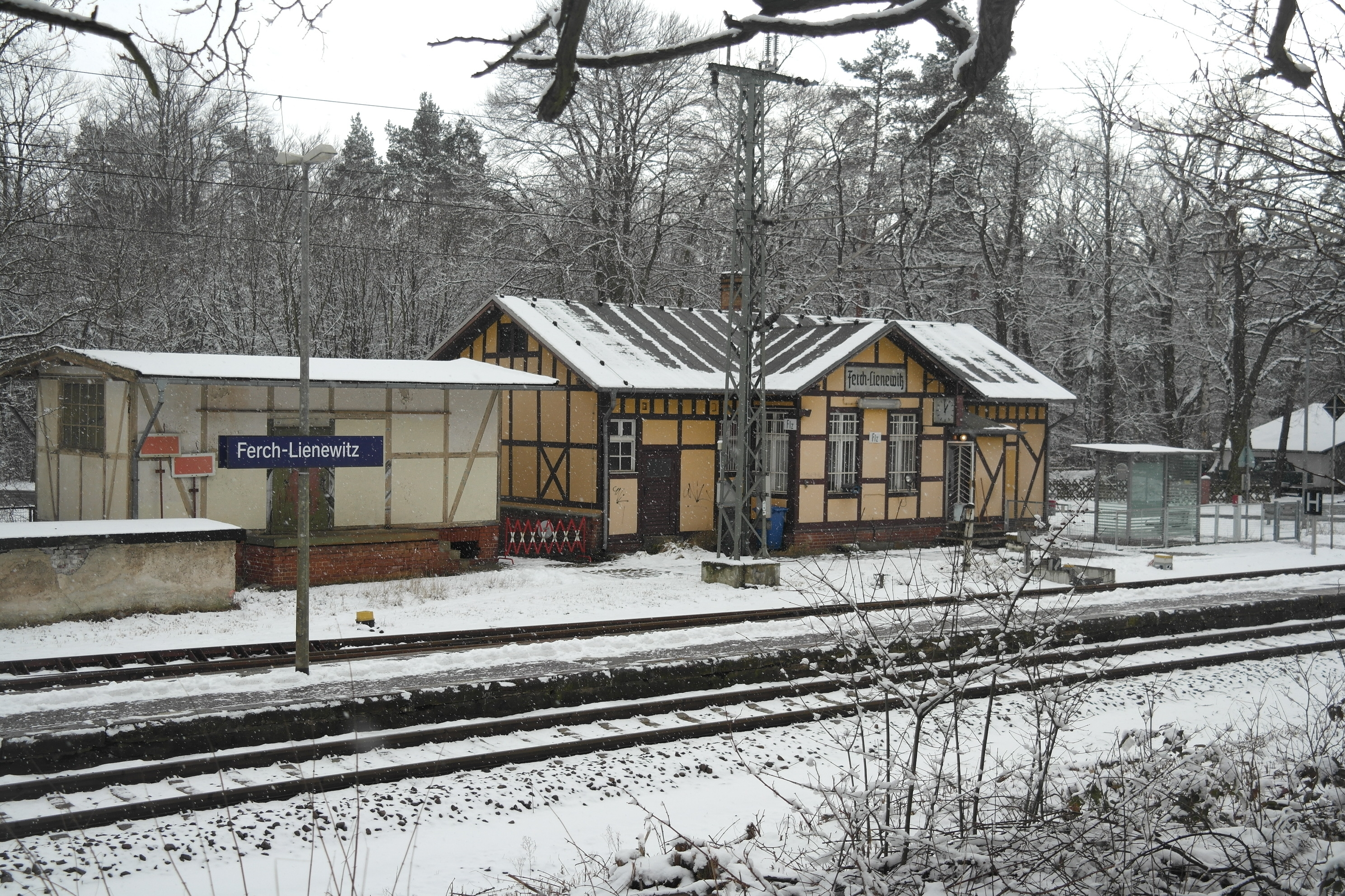 Bahnhof Ferch-Lienewitz